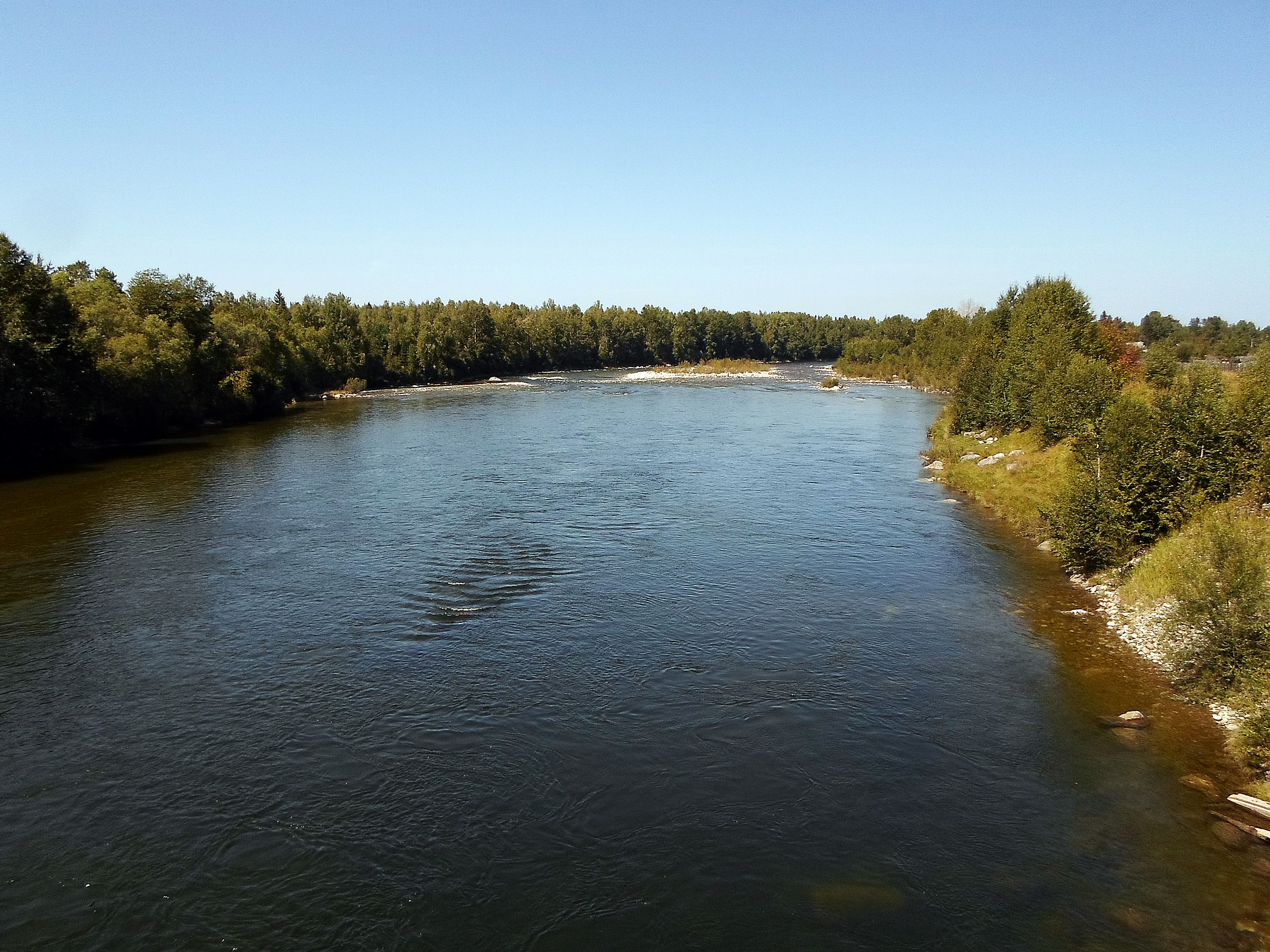 Вид на север на реку Снежную с моста федеральной автомагистрали "Байкал" у посёлка Выдрино. Ширина реки - 80 метров, до места впадения в Байкал - 5 км.